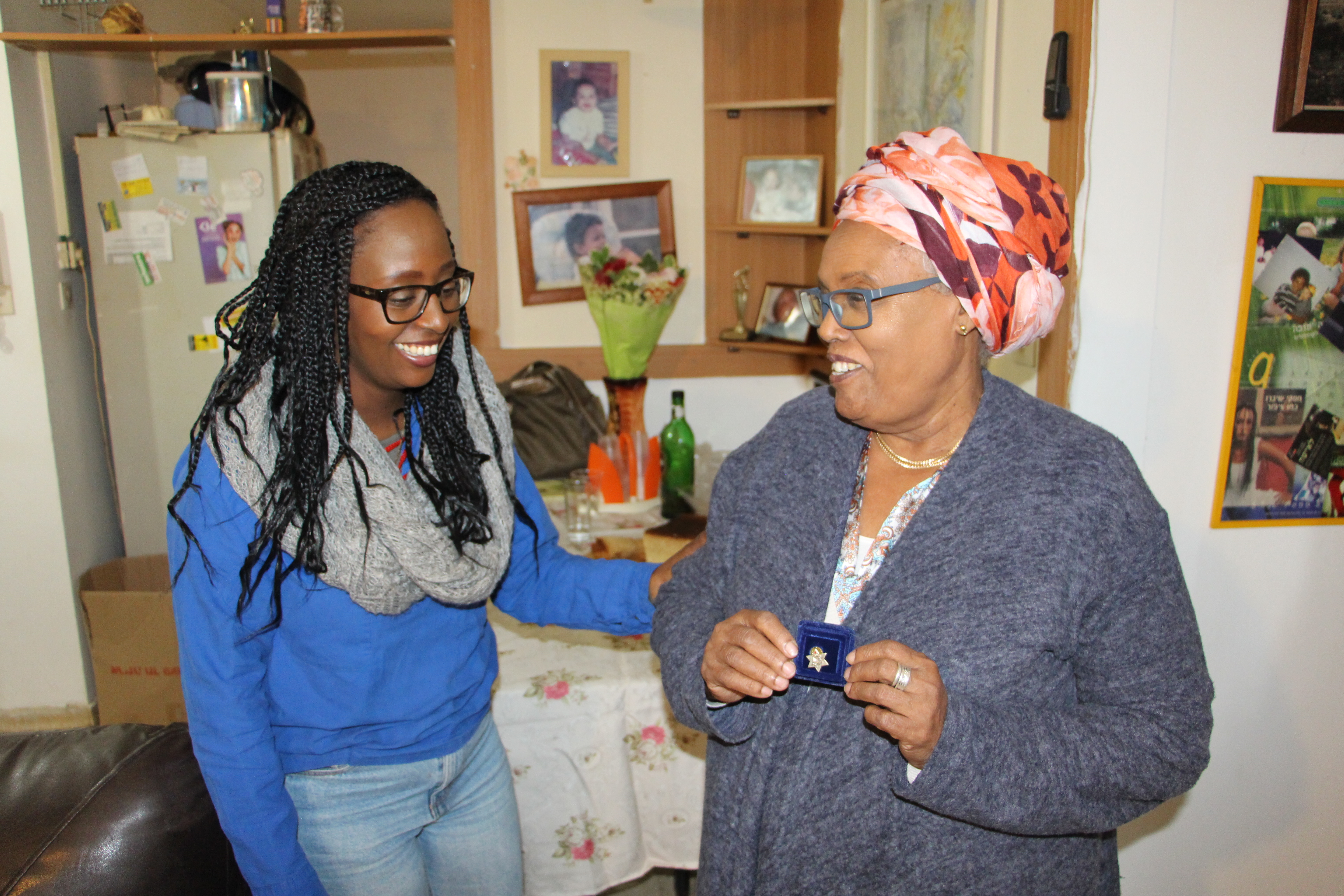 .חרות טקלה מציגה את סיכת אסירת ציון לנציגת תנועת הנוער העובד והלומד, גילה פקדו